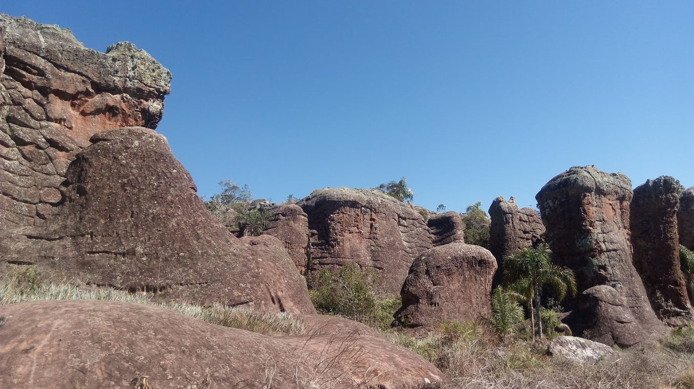 Formações em parque estadual Vila Velha